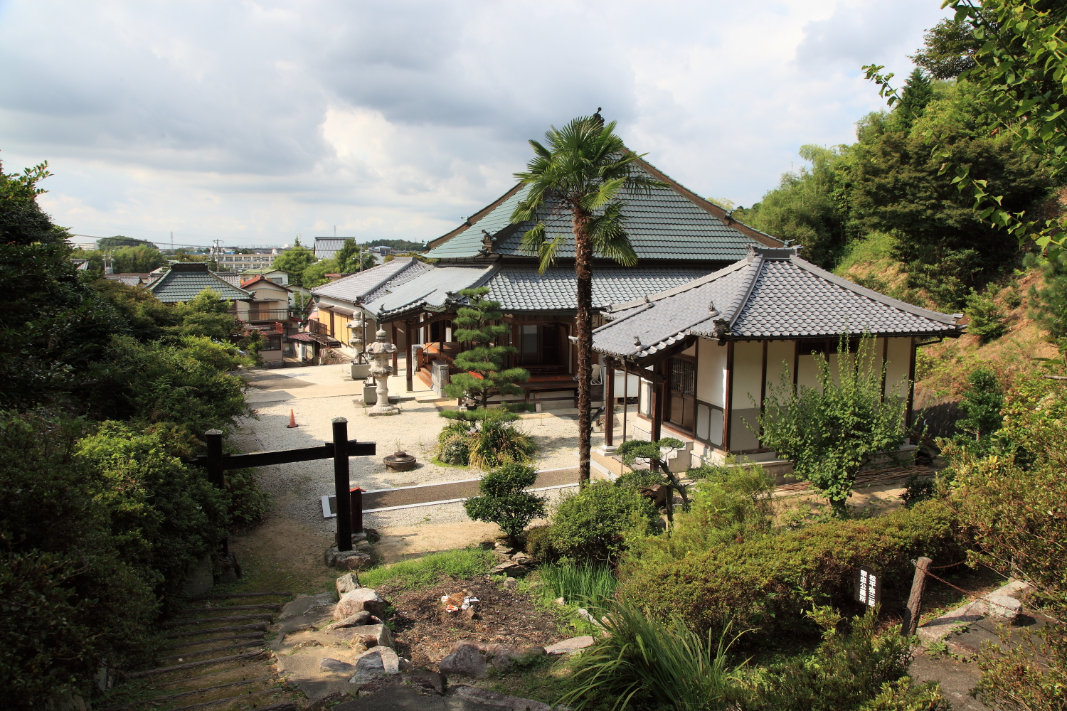 浄願寺（豊田市志賀町、2011年）